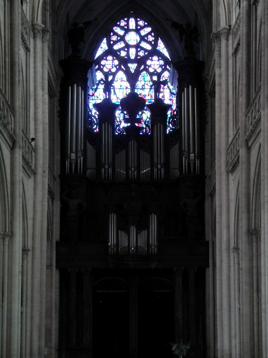 Cathédrale Notre-Dame de Coutances, Coutances, France